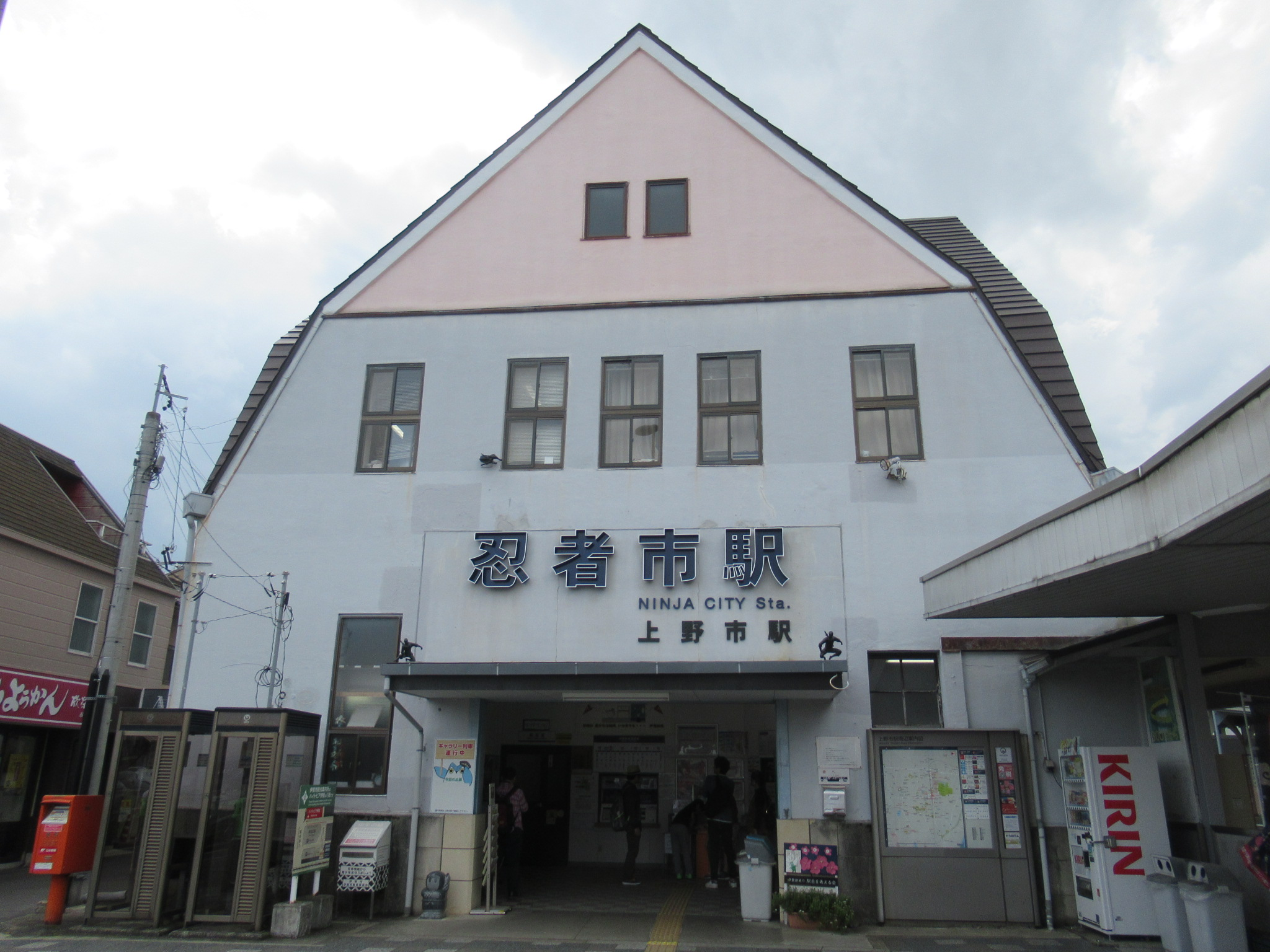 「忍者市駅」となった上野市駅